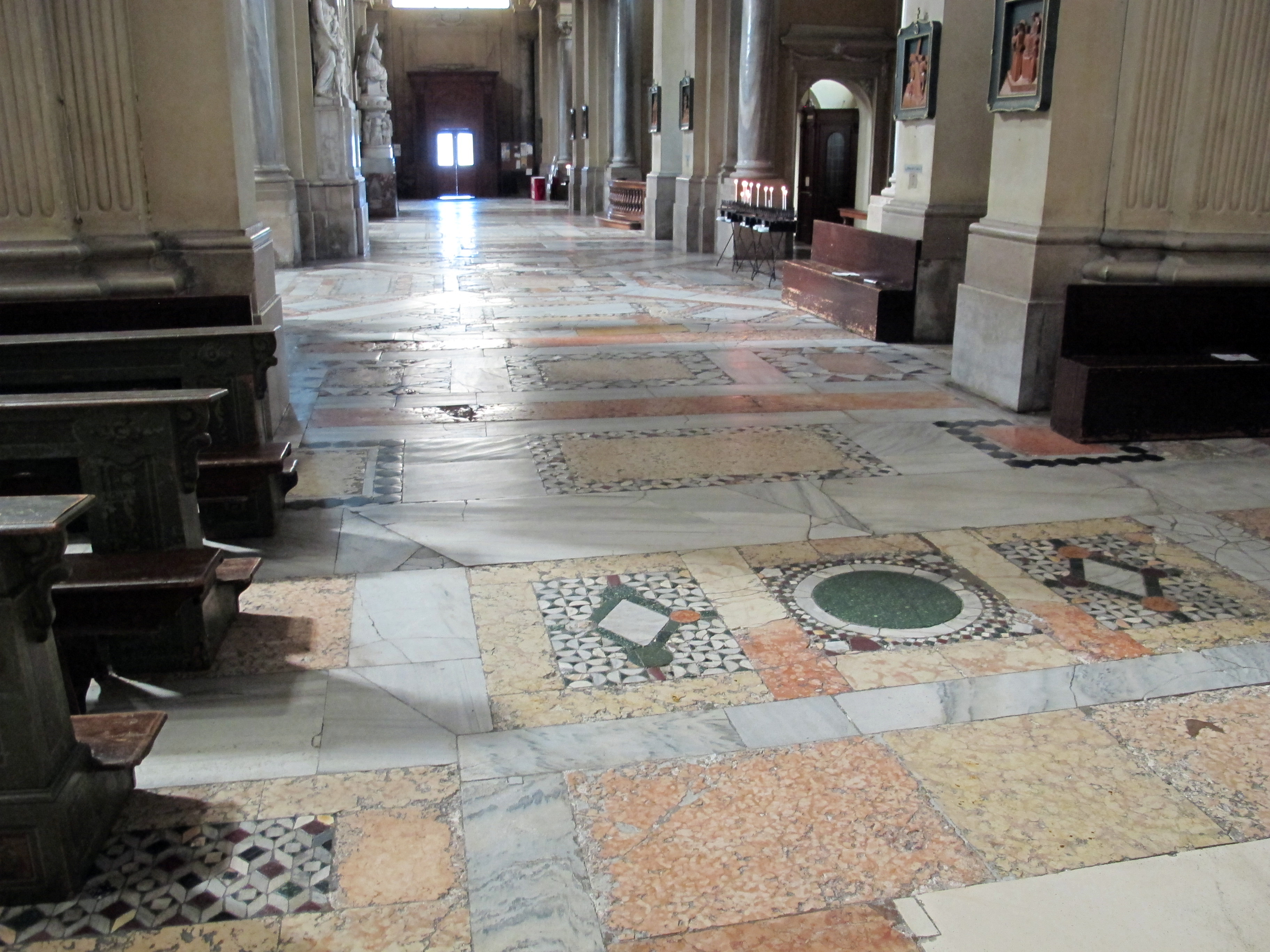 Duomo di ravenna, int., pavimento a opus sectile